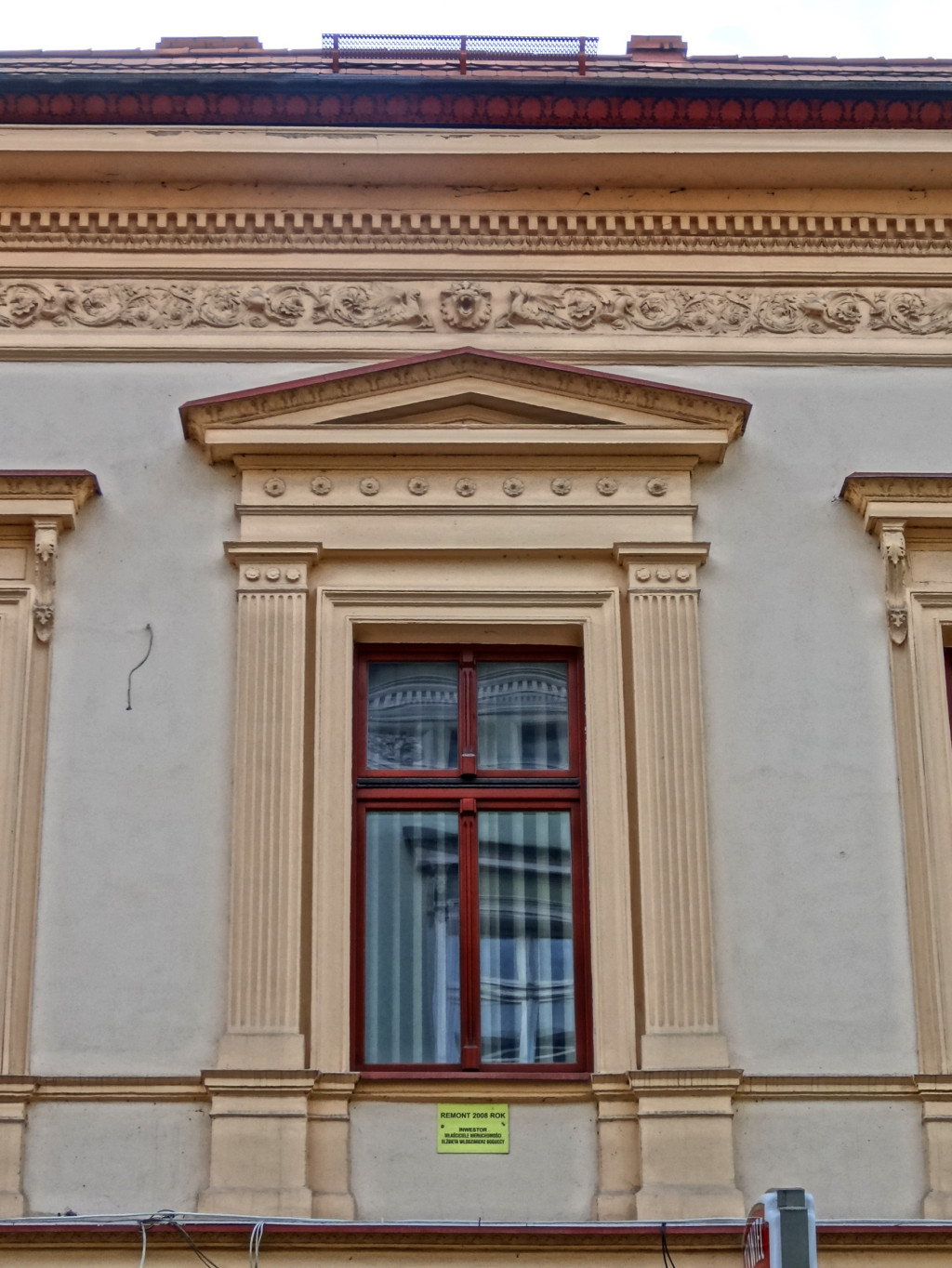 Kamienica przy ul. Długiej 62 w Bydgoszczy (poł XIX w.)